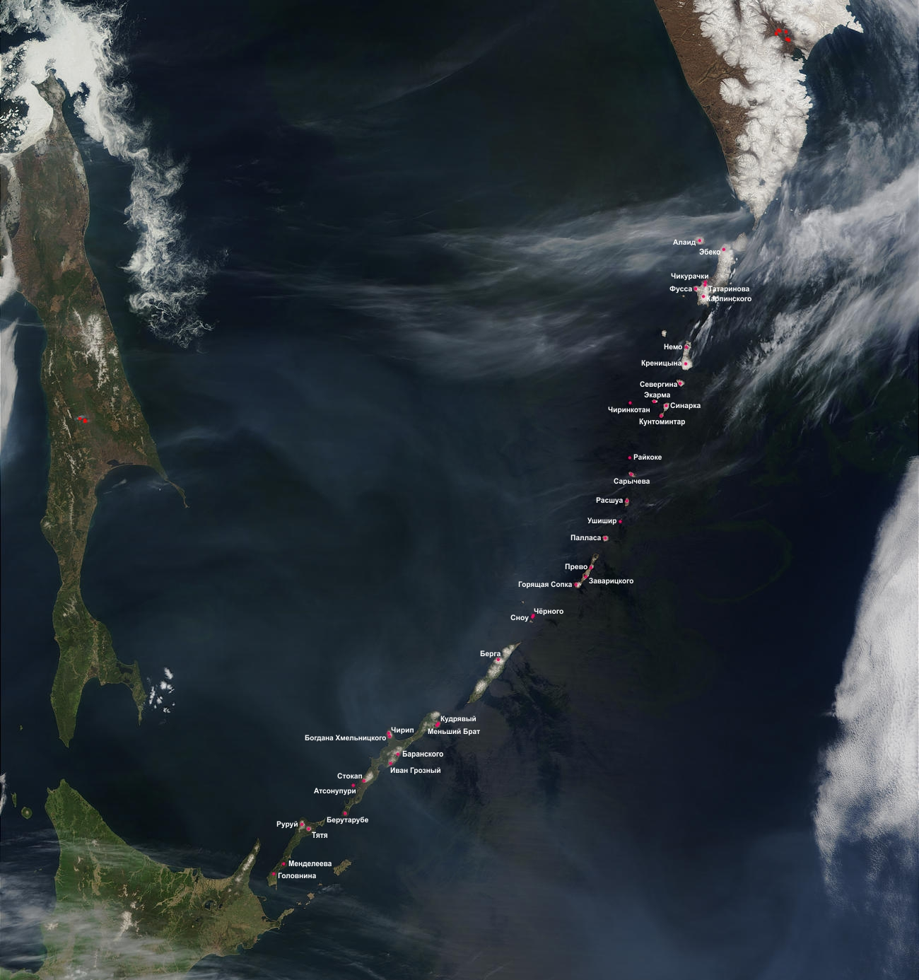 Фотокарта вулканов Курильских островов на основе космического снимка НАСА